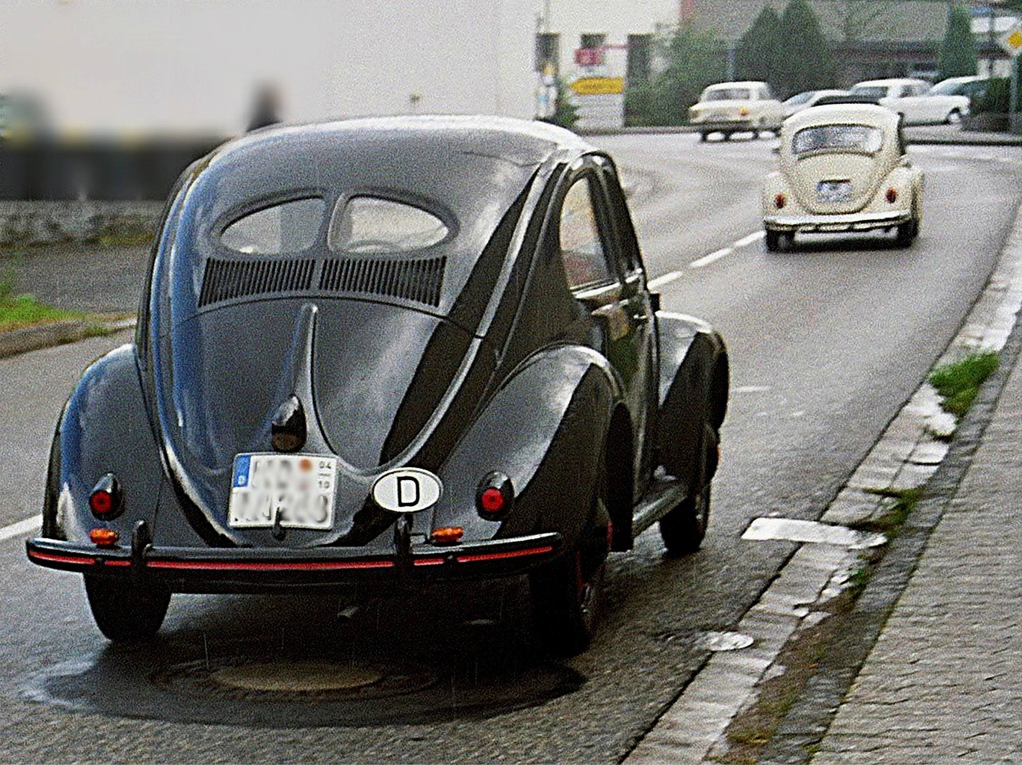 VW Standard, Baujahr 1950